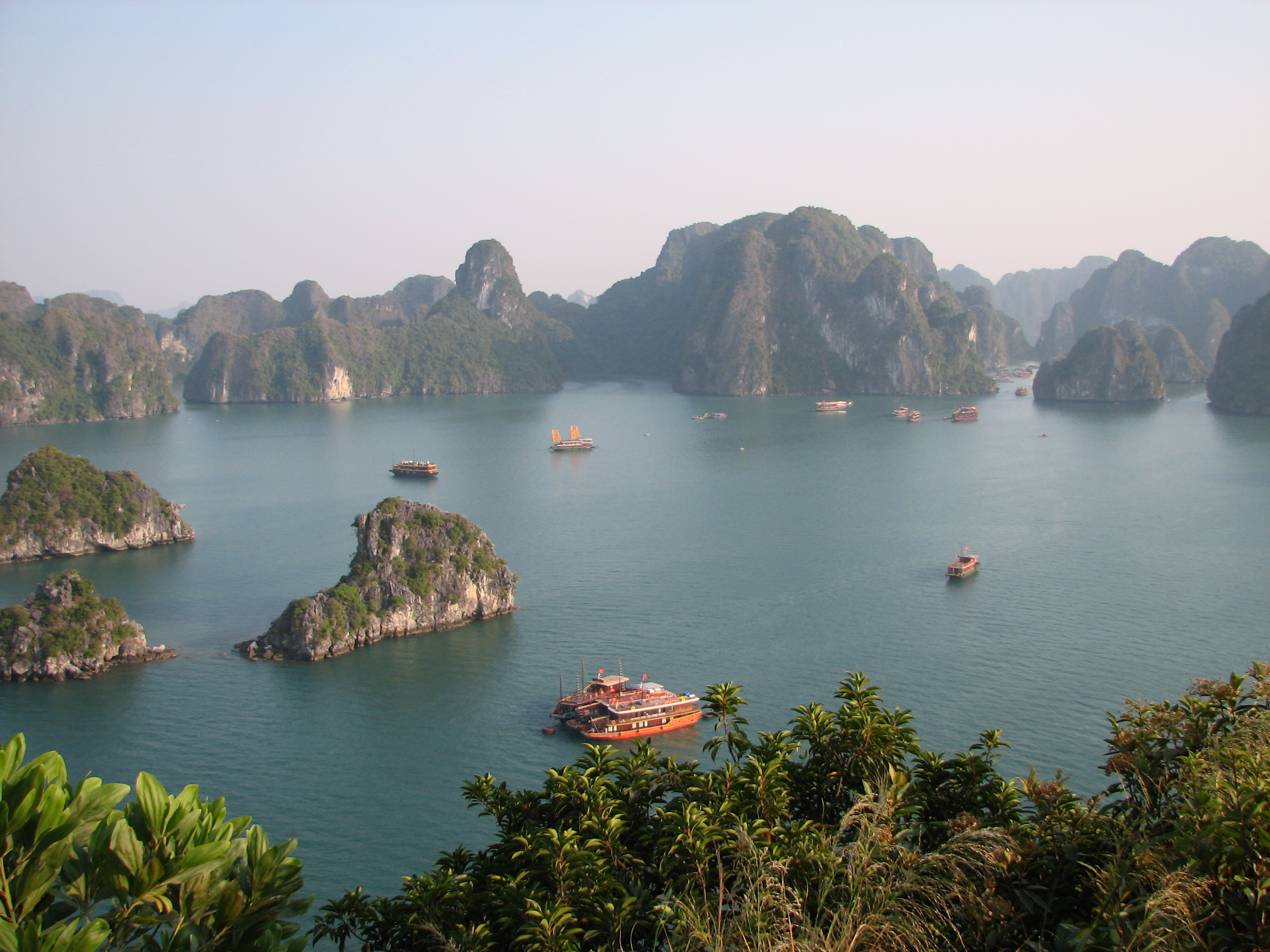 Ha Long Bay